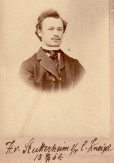 Foto von Hermann von Stutterheim als Student in Göttingen im Jahre 1864